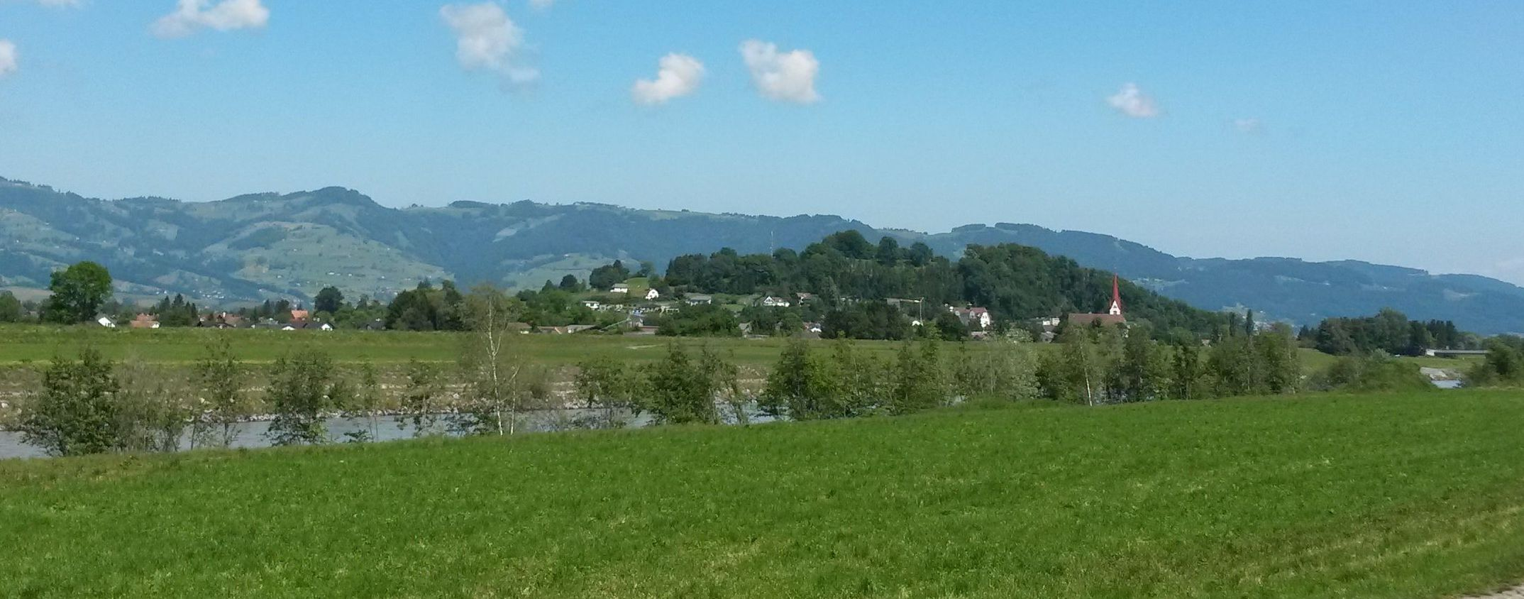 Montlingerberg mit dem Ort Montlingen. Fotografiert von Österreich